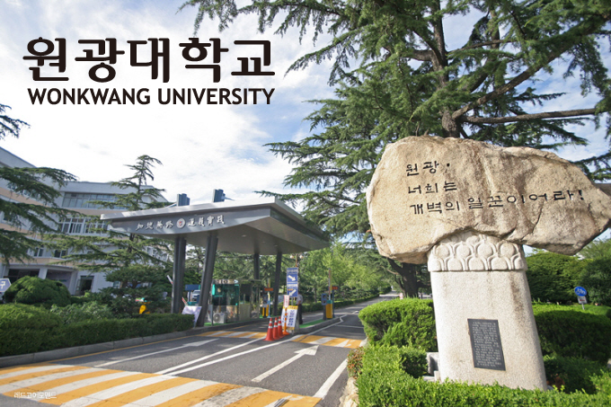 원광대학교정문사진및글짜